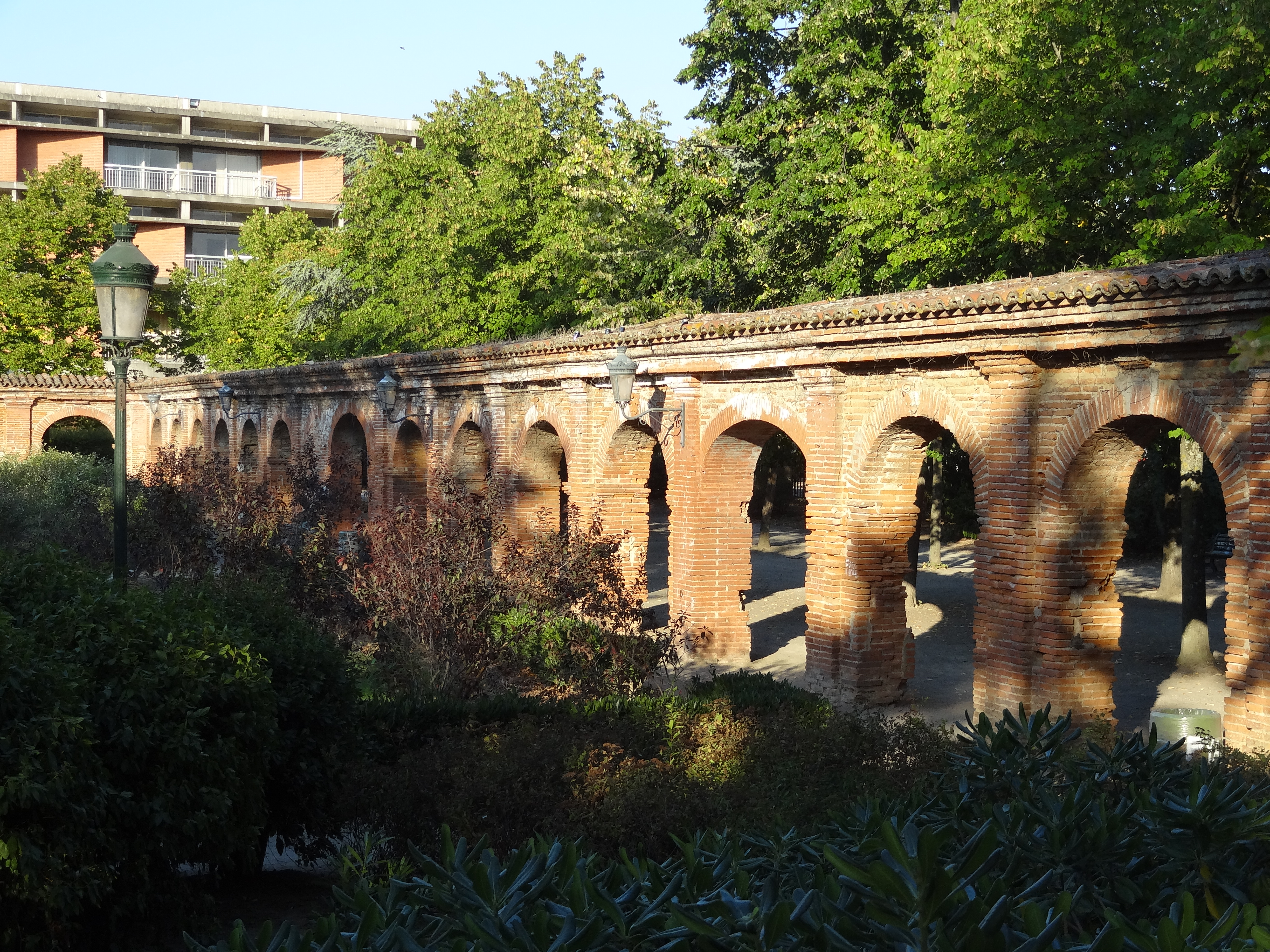 Ancien cloître des Chartreux, Toulouse .